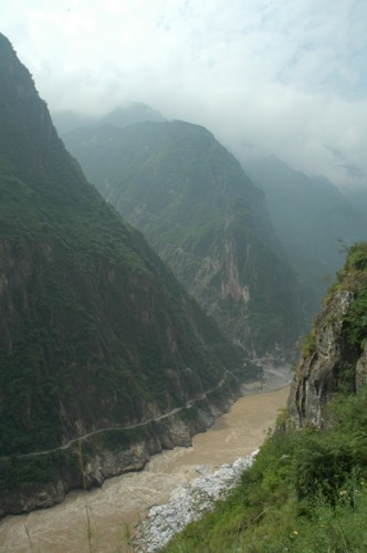 La garganta del Tigre